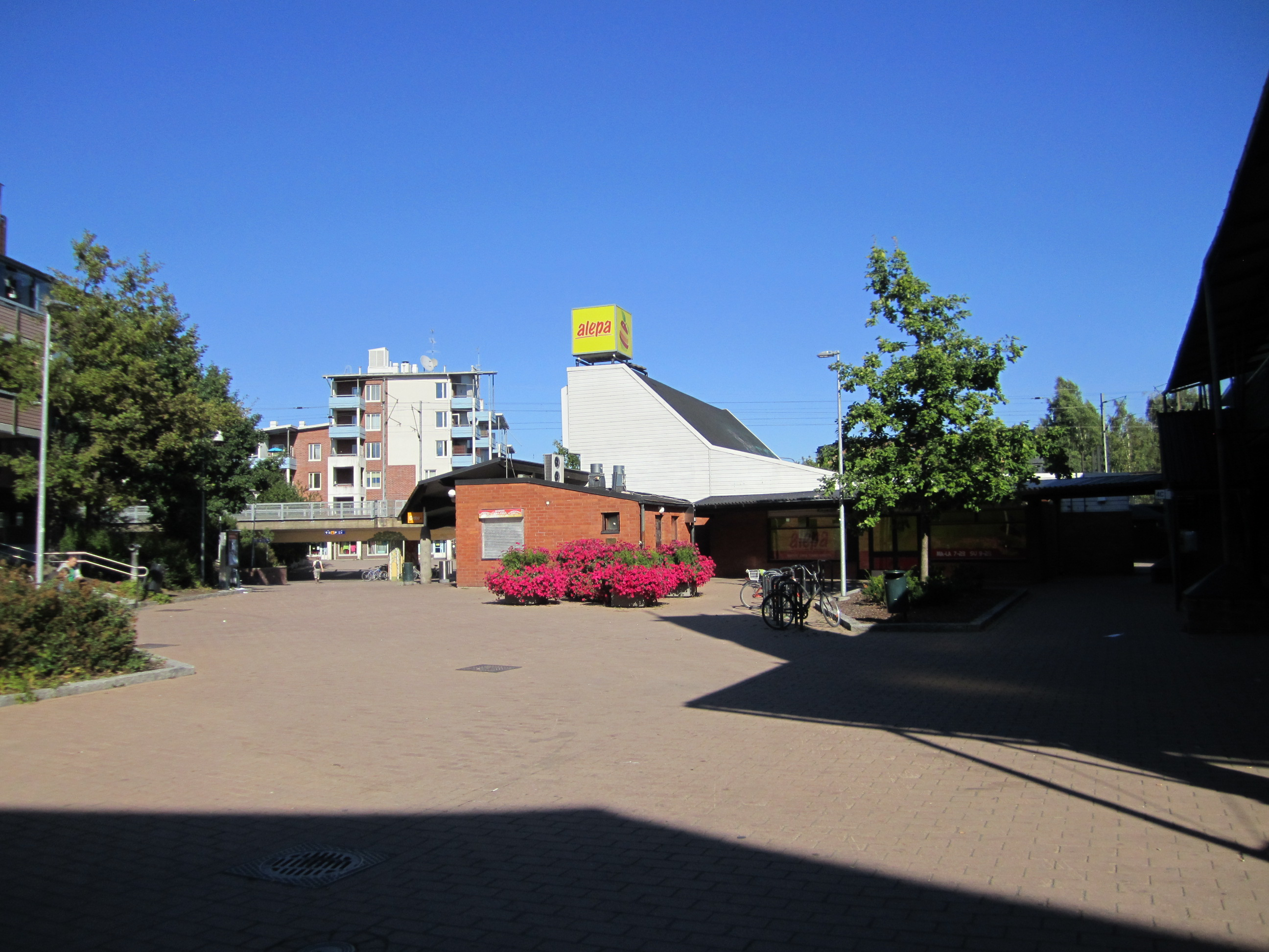 Malminkartanonaukio elokuussa 2015, kuvattuna aseman suuntaan.